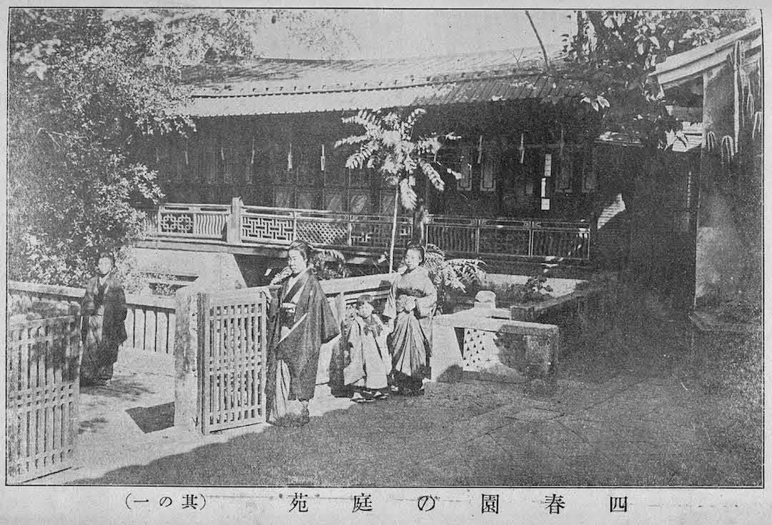 四春園の庭苑